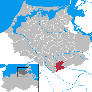 Glewitz in Mecklenburg-Vorpommern - District Nordvorpommern